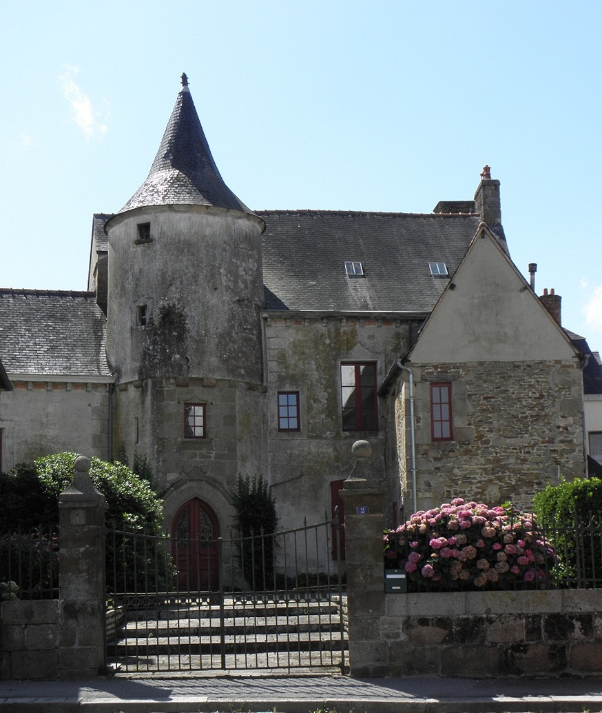 Logis de la Cour-Guinetaie, place Clémenceau à Antrain (35).